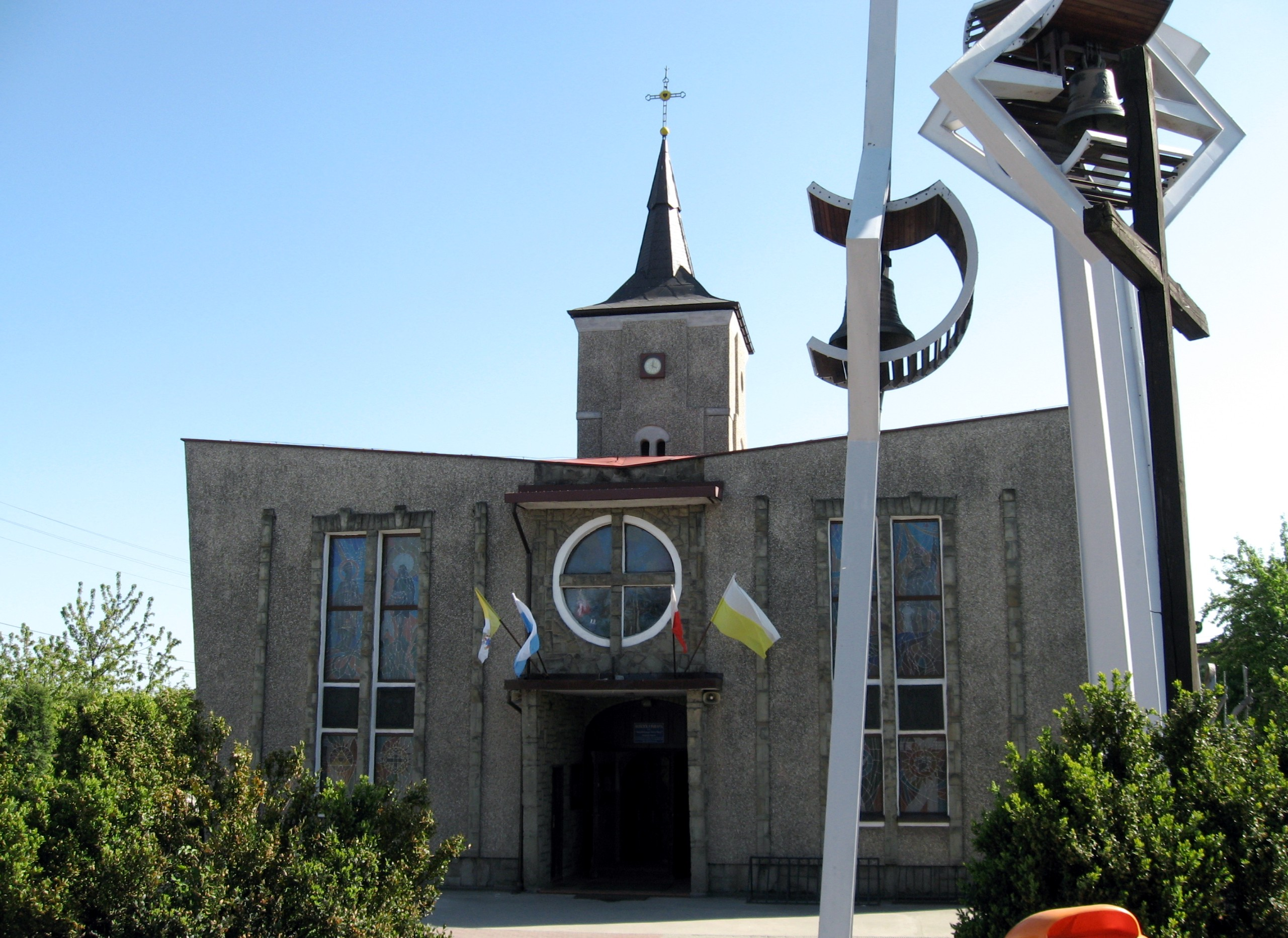 Kościół i budynek parafialny p.w. Niepokalanego Serca Maryi w Głożynach, dzielnicy Radlina